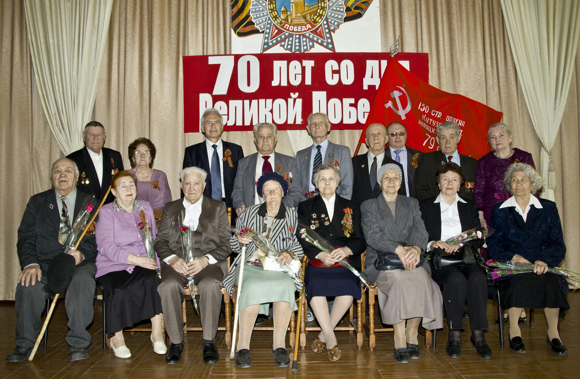 Торжественное собрание в честь 70-летия Победы в ВОВ